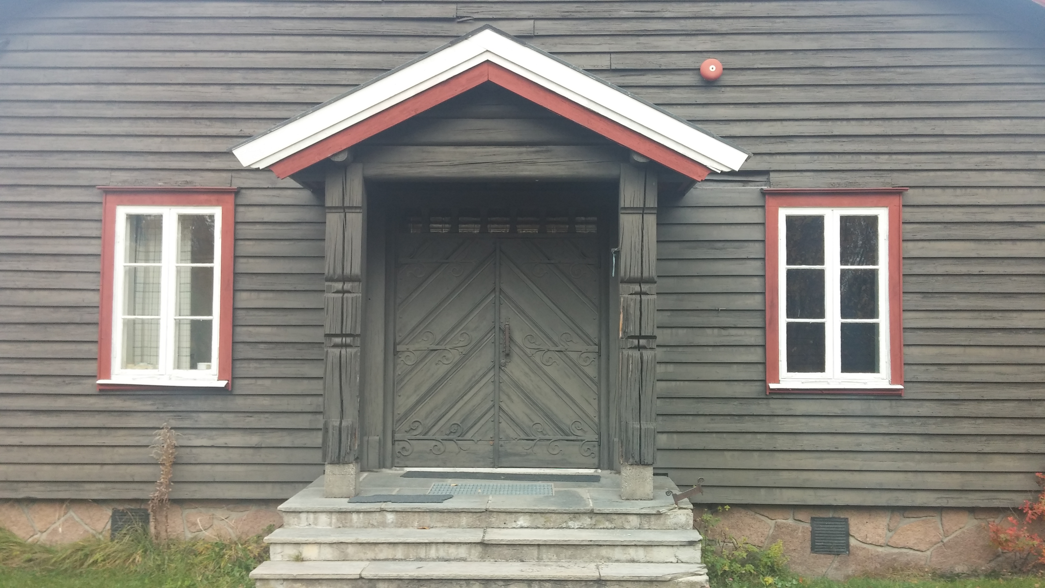 Offisersmessen Casino i Grefsrudleiren ved Holmestrand, bygget av tyskerne under andre verdenskrig, også benyttet til utdannelse av frontkjempere og hirdens vaktmannskaper til fangeleire